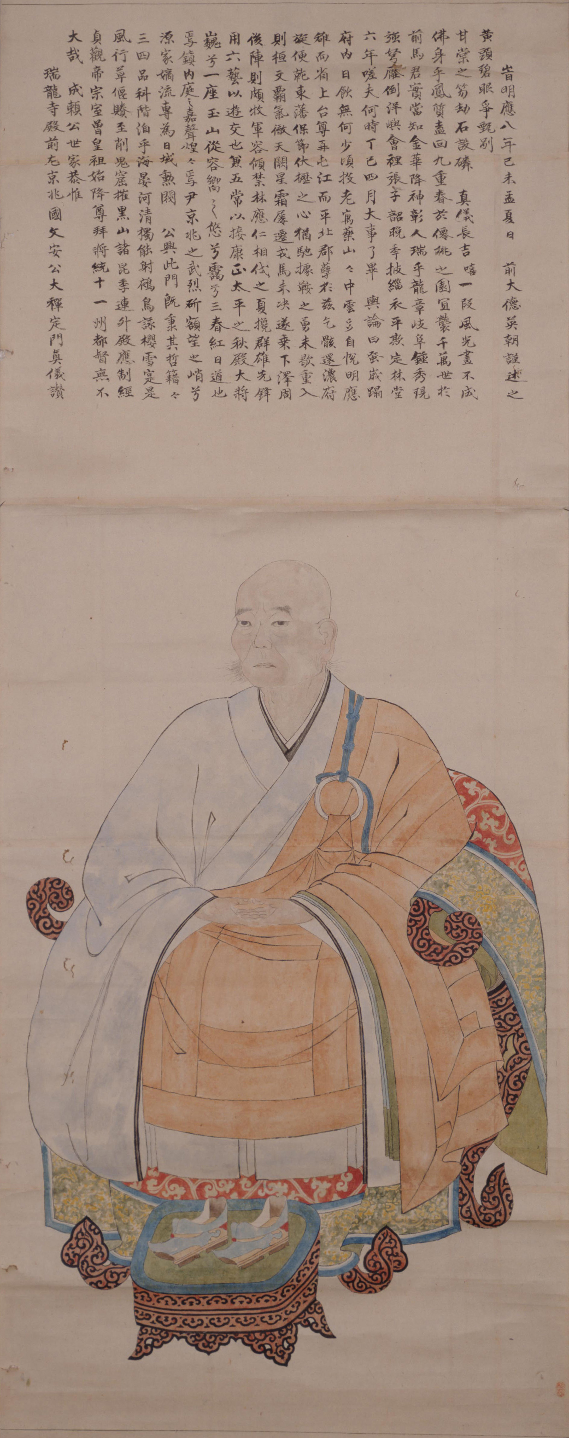 土岐成頼の肖像。